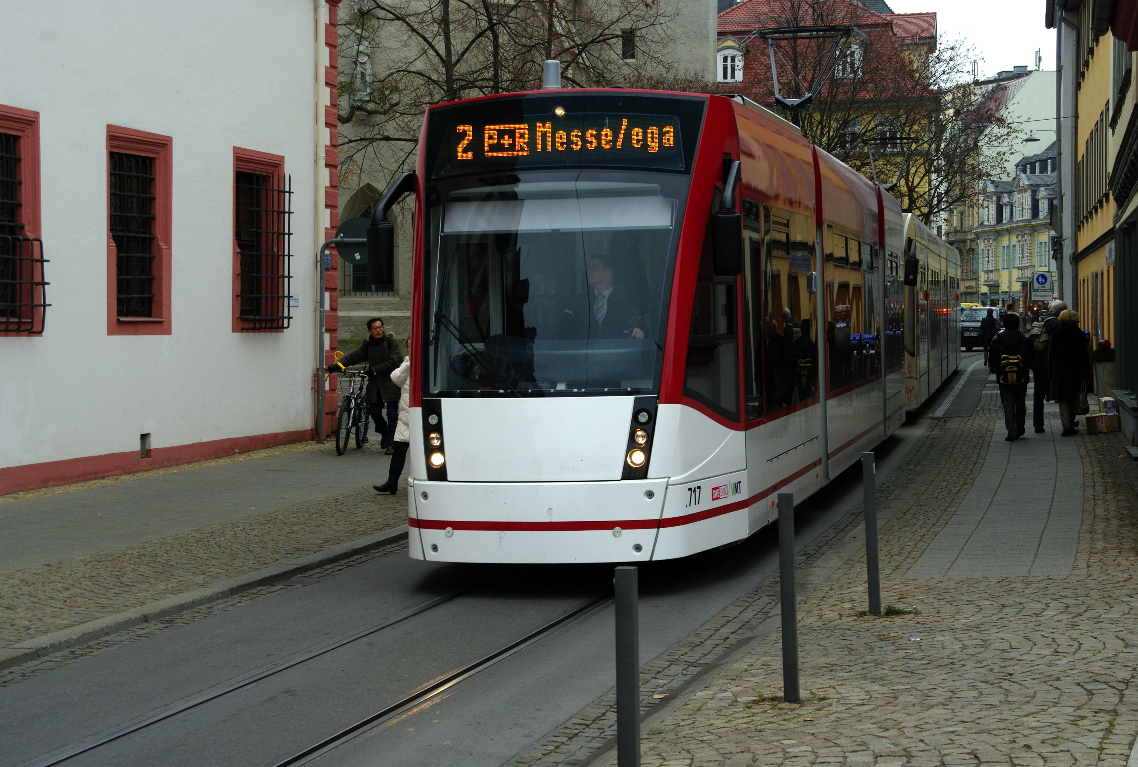 Ein Combino der Linie 2 Richtung Messe/ega der Stadtbahn Erfurt kurz nach der Haltestelle Angerbrunnen.